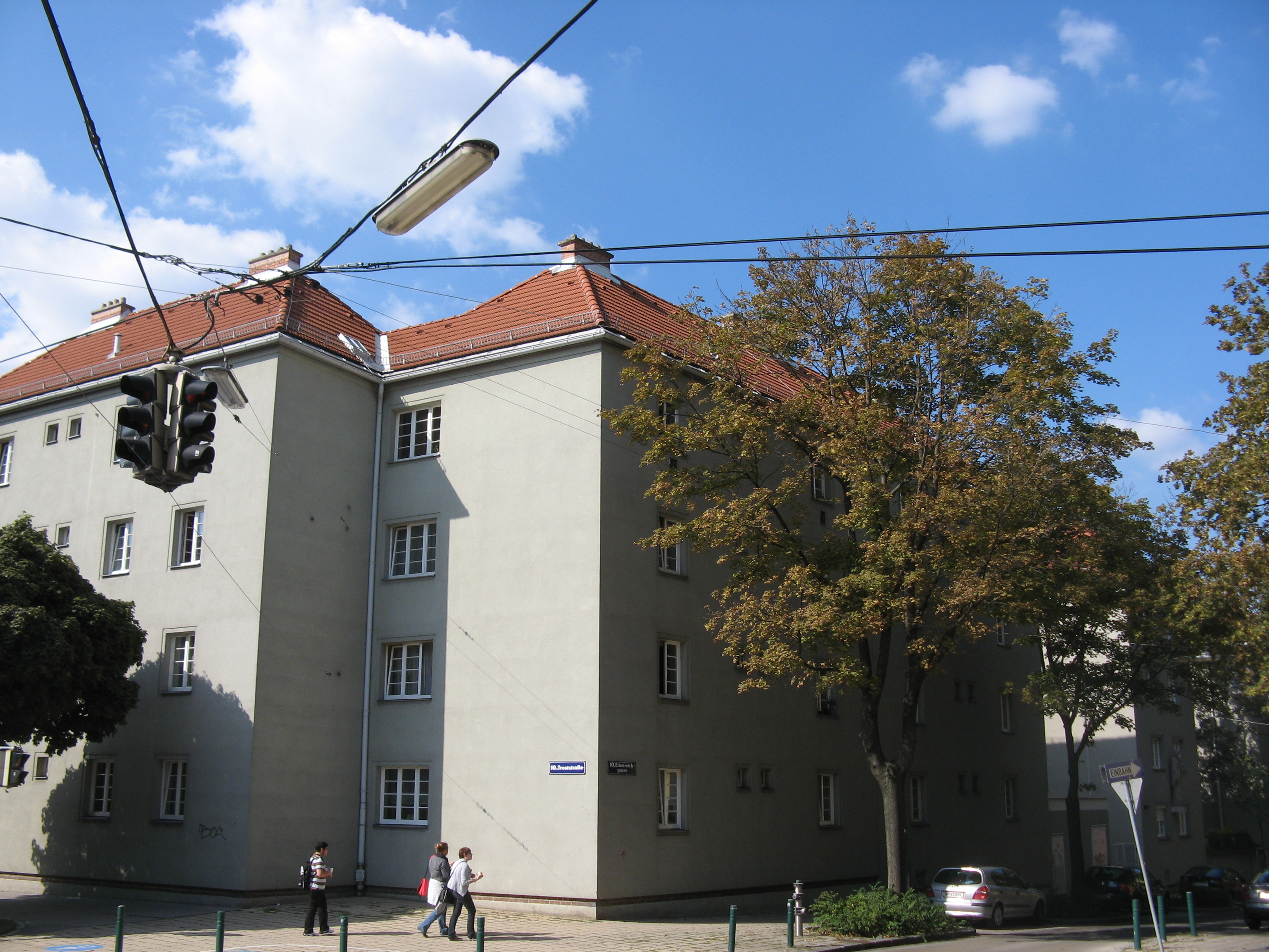 Ehemaliges Familienasyl St. Josef (1935/36) von Franz Wiesmann, Ettenreichgasse 42-44, Wien-Favoriten